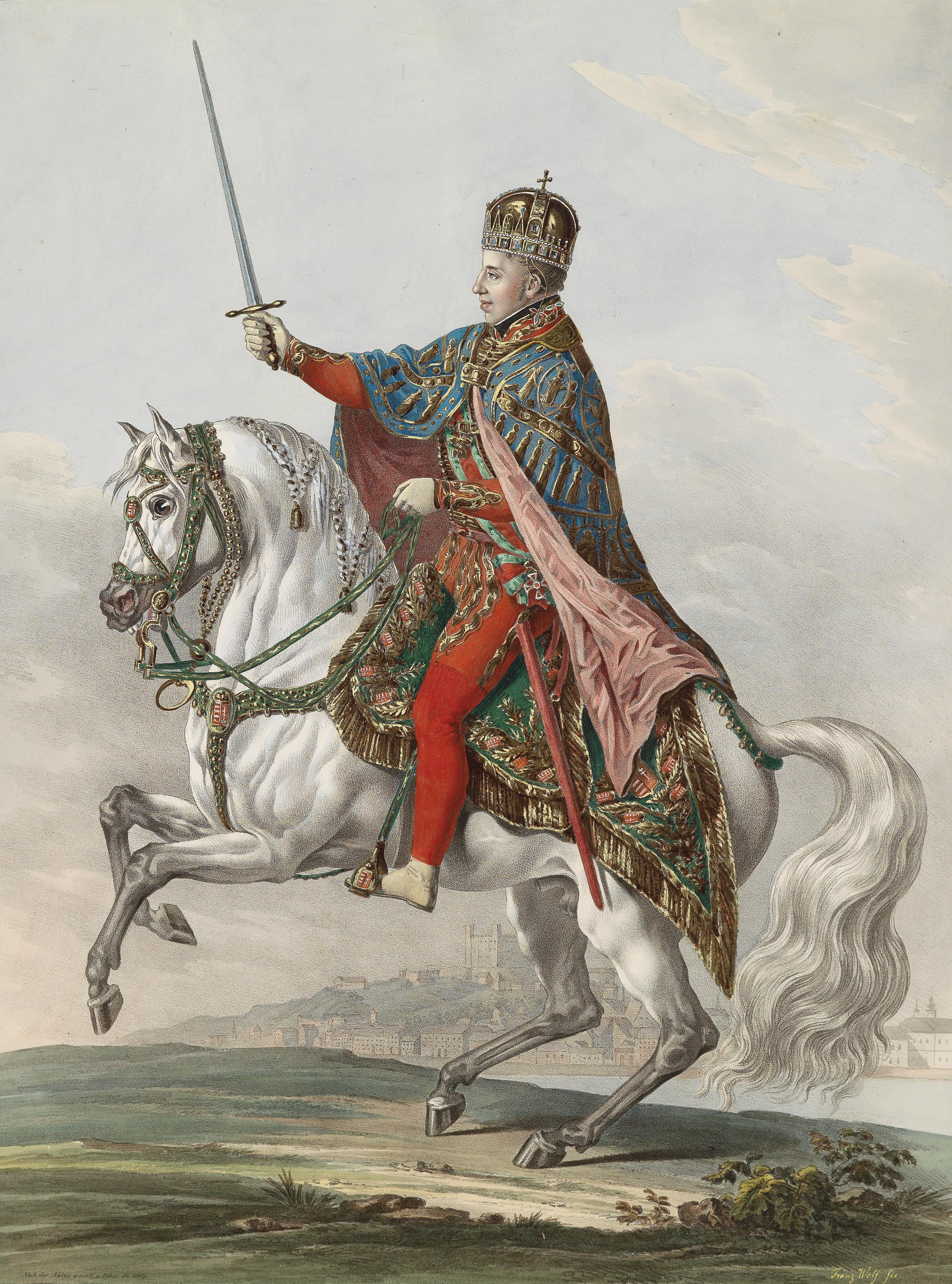 Kaiser Ferdinand I. von Österreich im Krönungsgewand (1830) als König von Ungarn, Gouache auf Papier, 12 x 16 cm